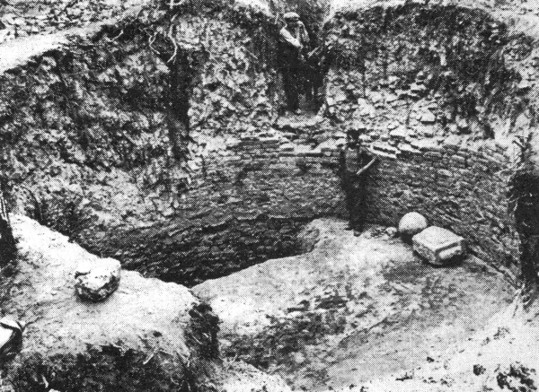 Hrad orlovice - spodek vykopané věže, 30. léta 20. století